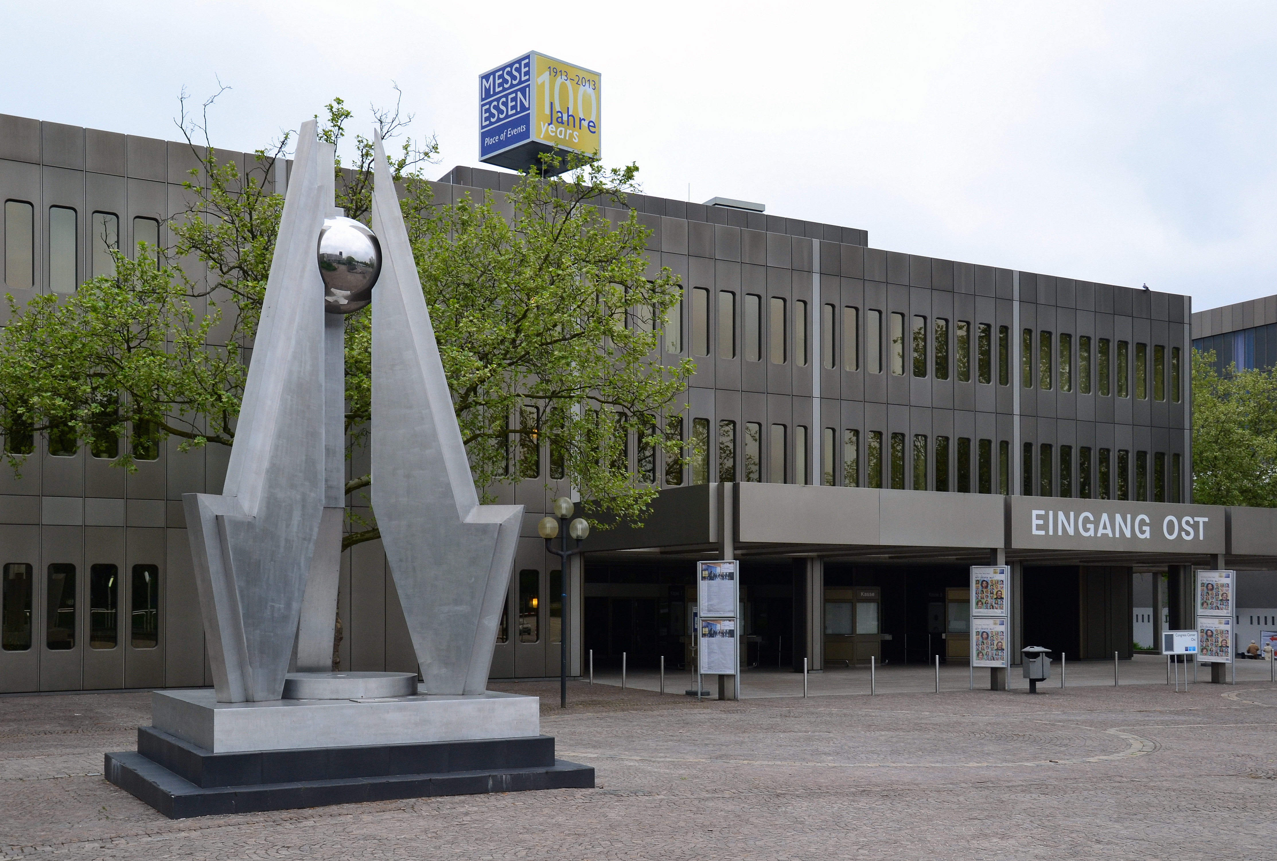 Messe Essen, Osteingang; links die Skulptur "Energie"